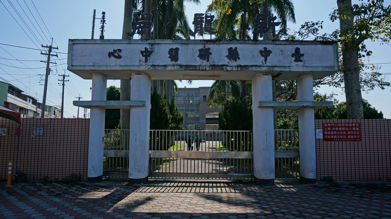 中文（台灣）: 新社高中(新龍崗)